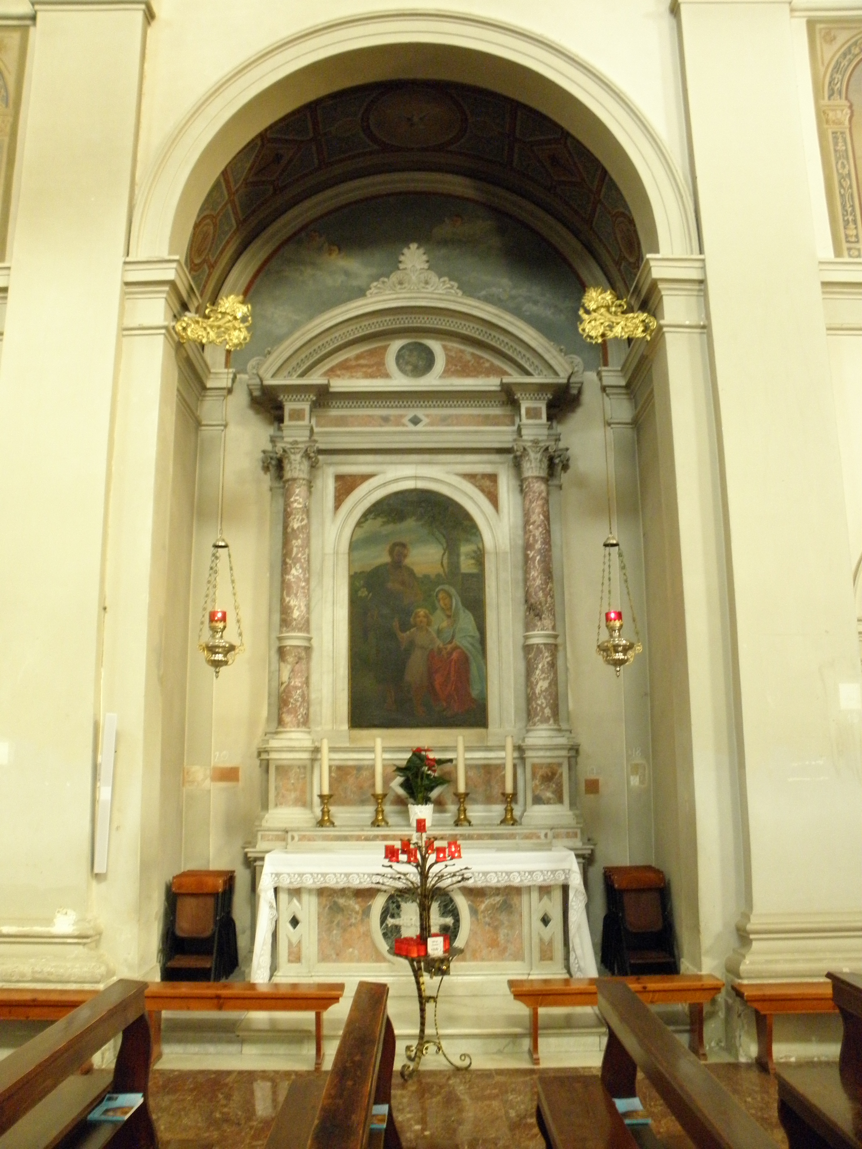 Quarto d'Altino, l'interno della chiesa parrocchiale di San Michele Arcangelo.